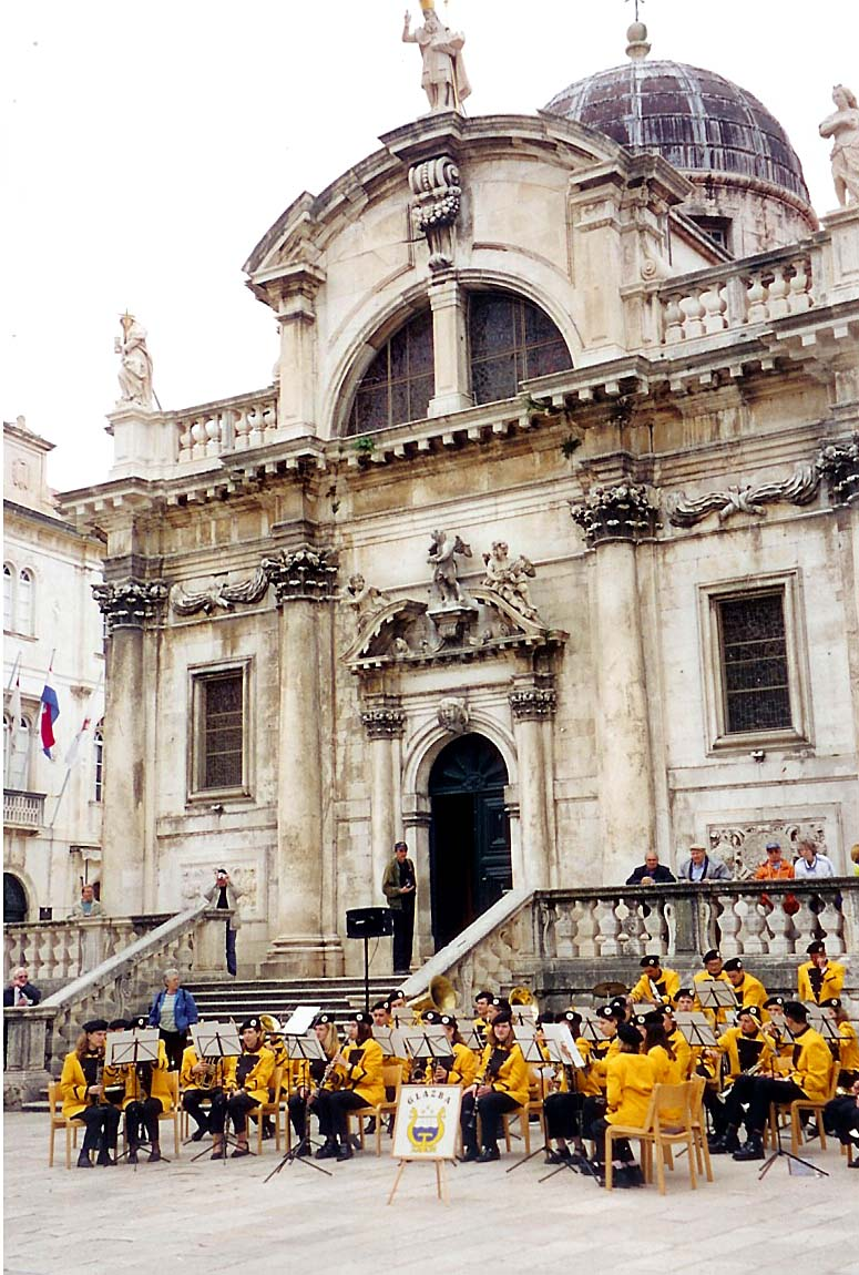 Concert virun der Houmass.